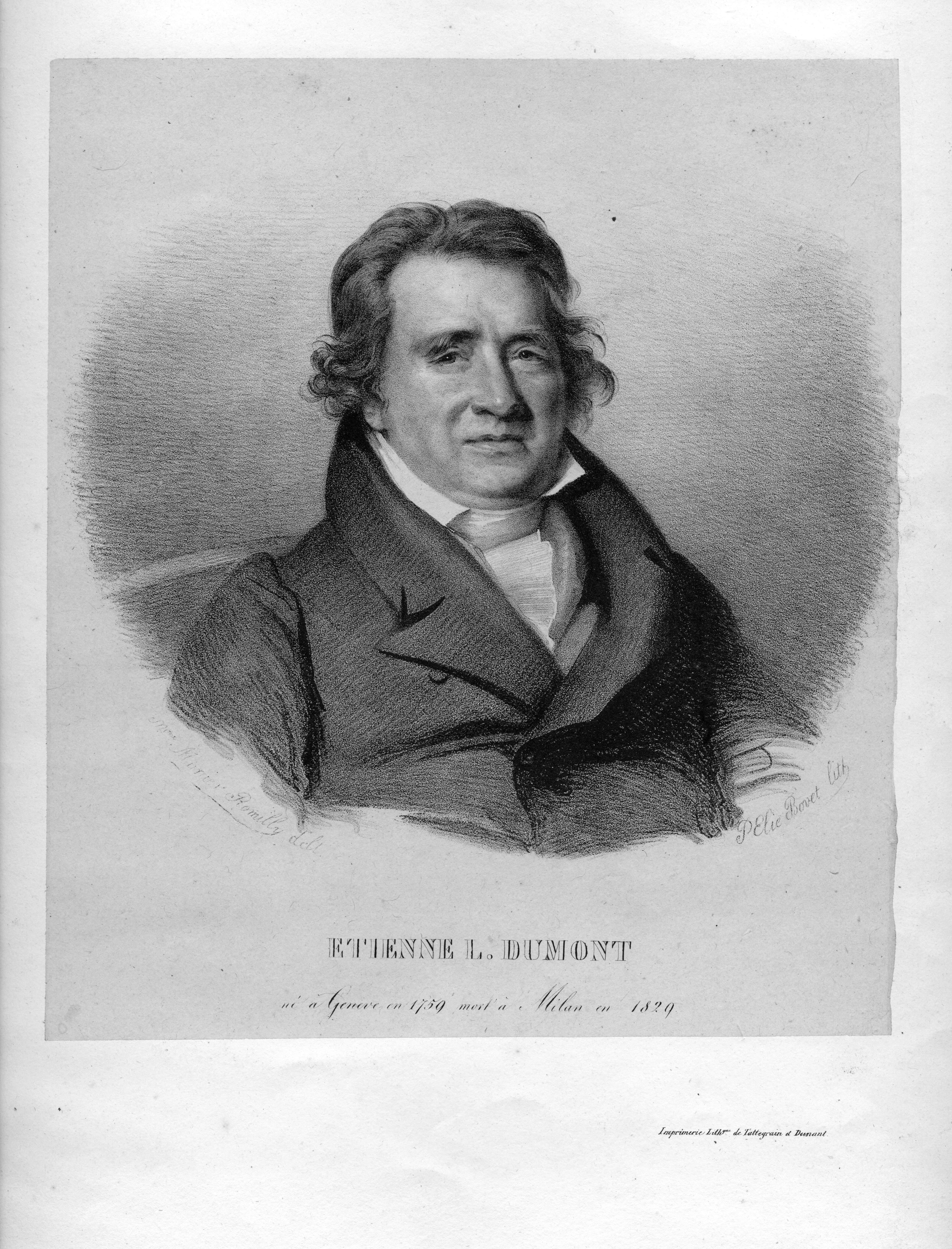 Portrait de Étienne Dumont (1759-1829)